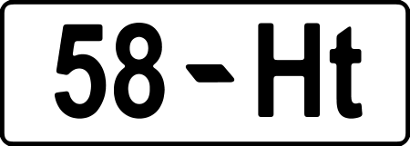 Румынский автомобильный номер 1908-1966 годов